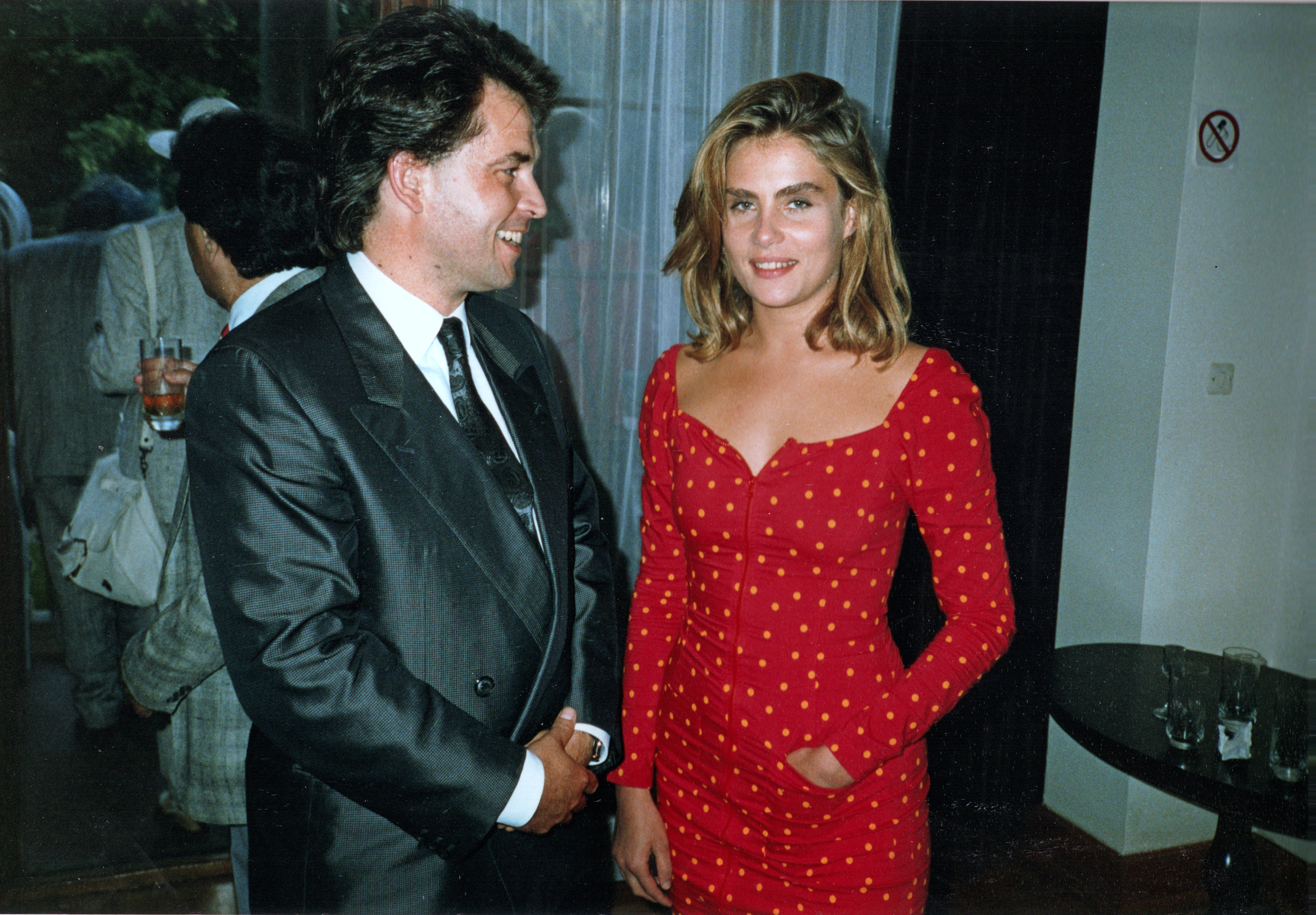 Emmanuelle Seigner en 1988 pour le film Frantic. À sa droite, probablement Artus de Penguern.